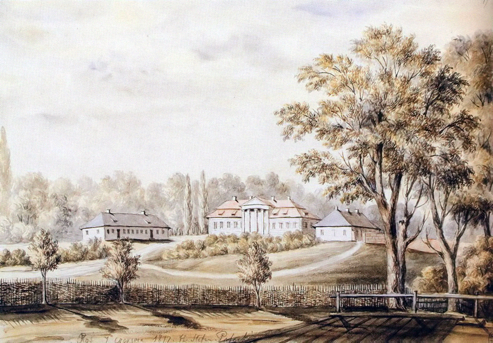 Беларуская (тарашкевіца): Рось (Roś), сядзіба Патоцкіх (Patocki)